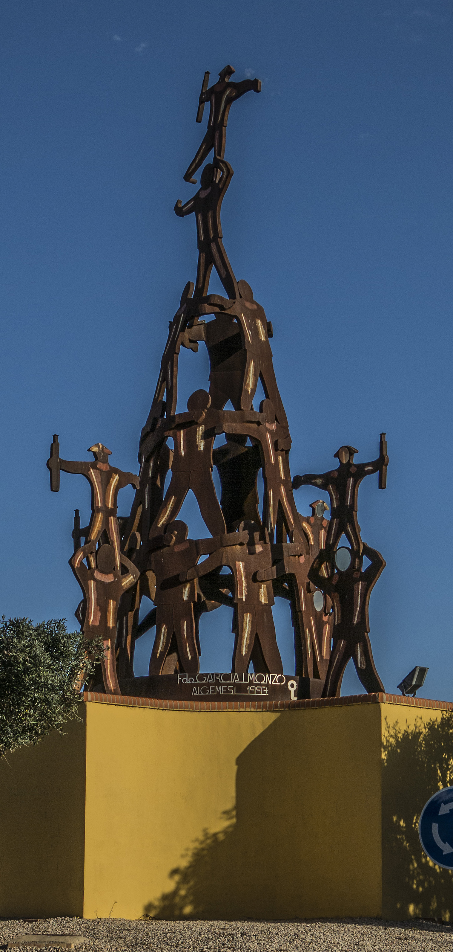 Algemesí és un municipi del País Valencià situat a la comarca de la Ribera Alta. Limita amb Alzira, Alginet i Guadassuar (a la mateixa comarca); i amb Albalat de la Ribera, Polinyà de Xúquer i Sollana (a la Ribera Baixa).